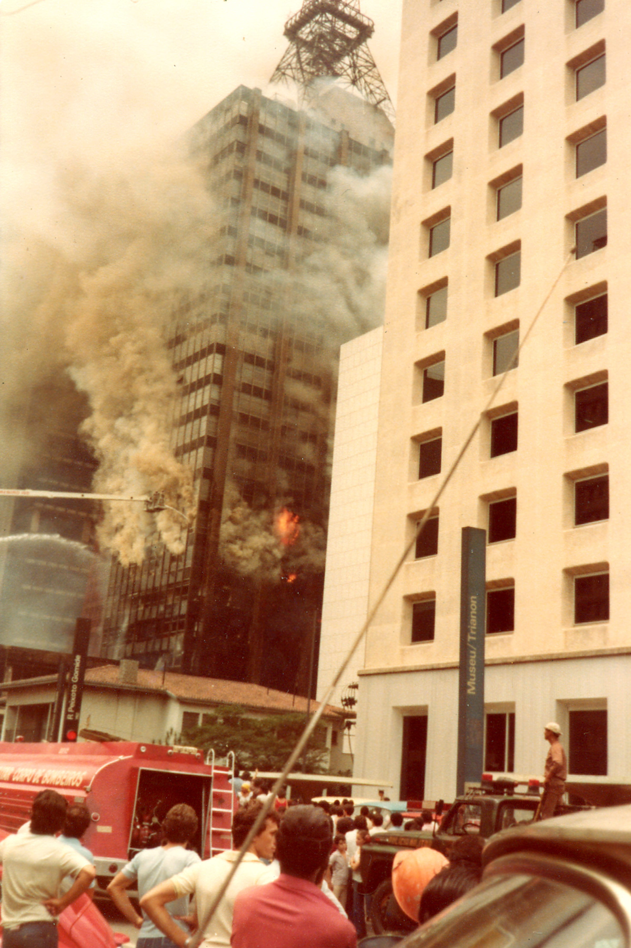 Segunda fase do incêndio ocorrido no Edifício Grande Avenida, em 14 de fevereiro de 1981, na Avenida Paulista a 50 metros da rua Peixoto Gomide, na cidade de São Paulo, Brasil. Na tarde daquele dia ocorreu o incêndio de grandes proporções, tendo início na sobreloja e destruindo todo o prédio. Dezessete pessoas morreram. Era sábado de carnaval e o prédio estava semivazio. O fogo já estava avançando para outros andares. Uma pessoa do povo pegou tinta cal, e escreveu no alfalto, na outra pista da avenida: Calma! Calma!